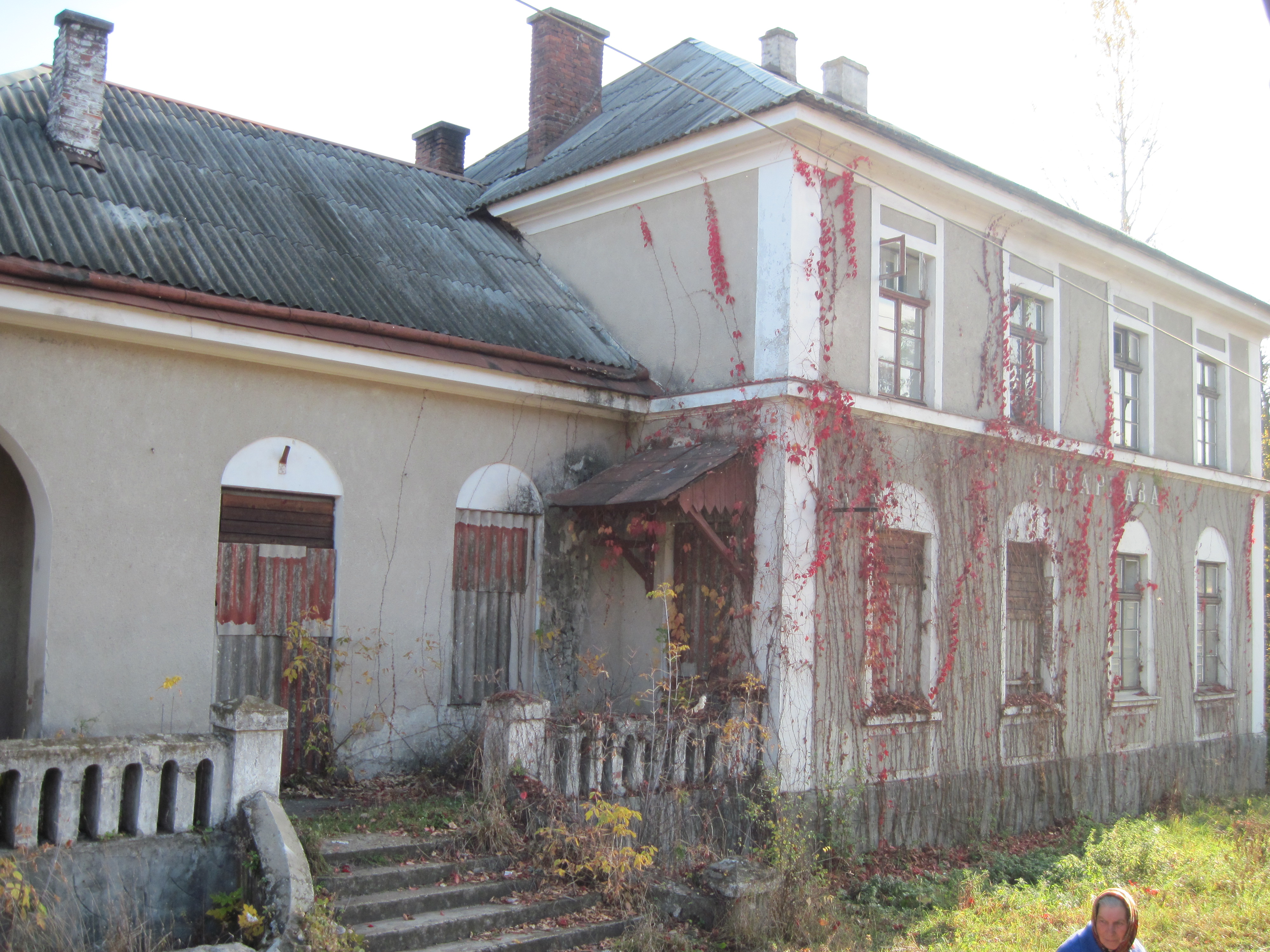 Станція Скваржава, осінь 2014